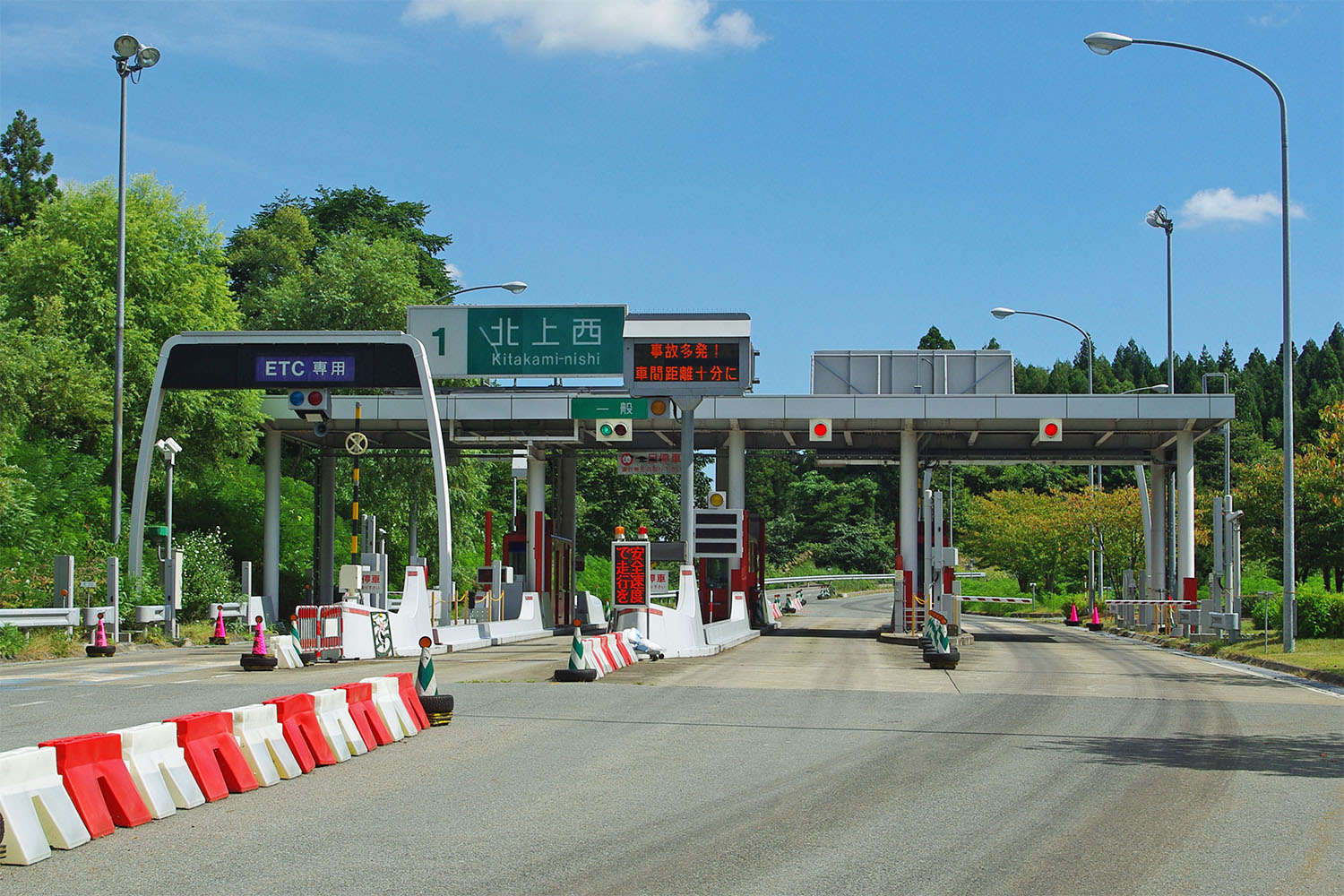 秋田自動車道 北上西インターチェンジ